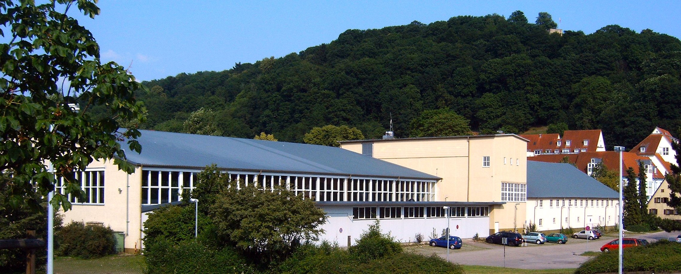 Stadthalle in Herrenberg, eröffnet 1936